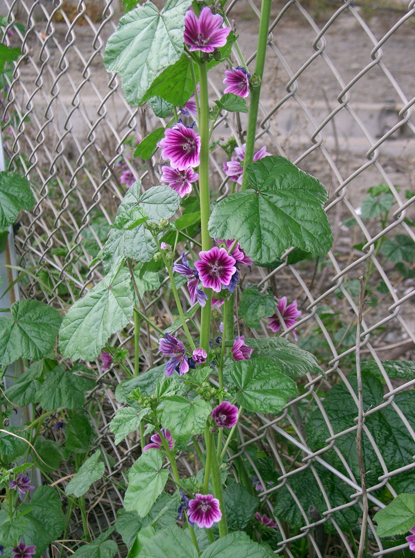 Malva sylvestris var. mauritiana